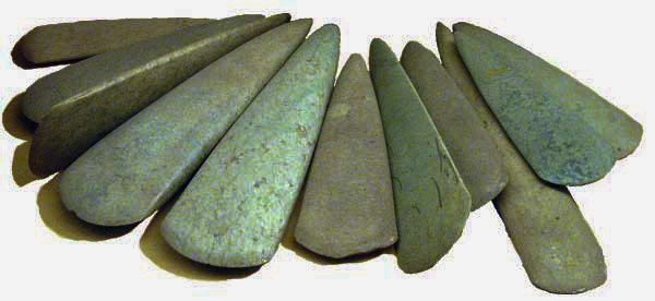 Haches de prestige en pierre polie du Néolithique (Dépot dit de "Bénon"). Taillées dans de la fibrolite sans doute d'origine locale et dans de la roche verte probablement extraite dans les Alpes Date : 5 000 BP - (3000 BC) Lieu : Arzon, Morbihan, France Author : Pline photo ou réalisation (schéma) personnelle, Musée d'Archéologie nationale, France